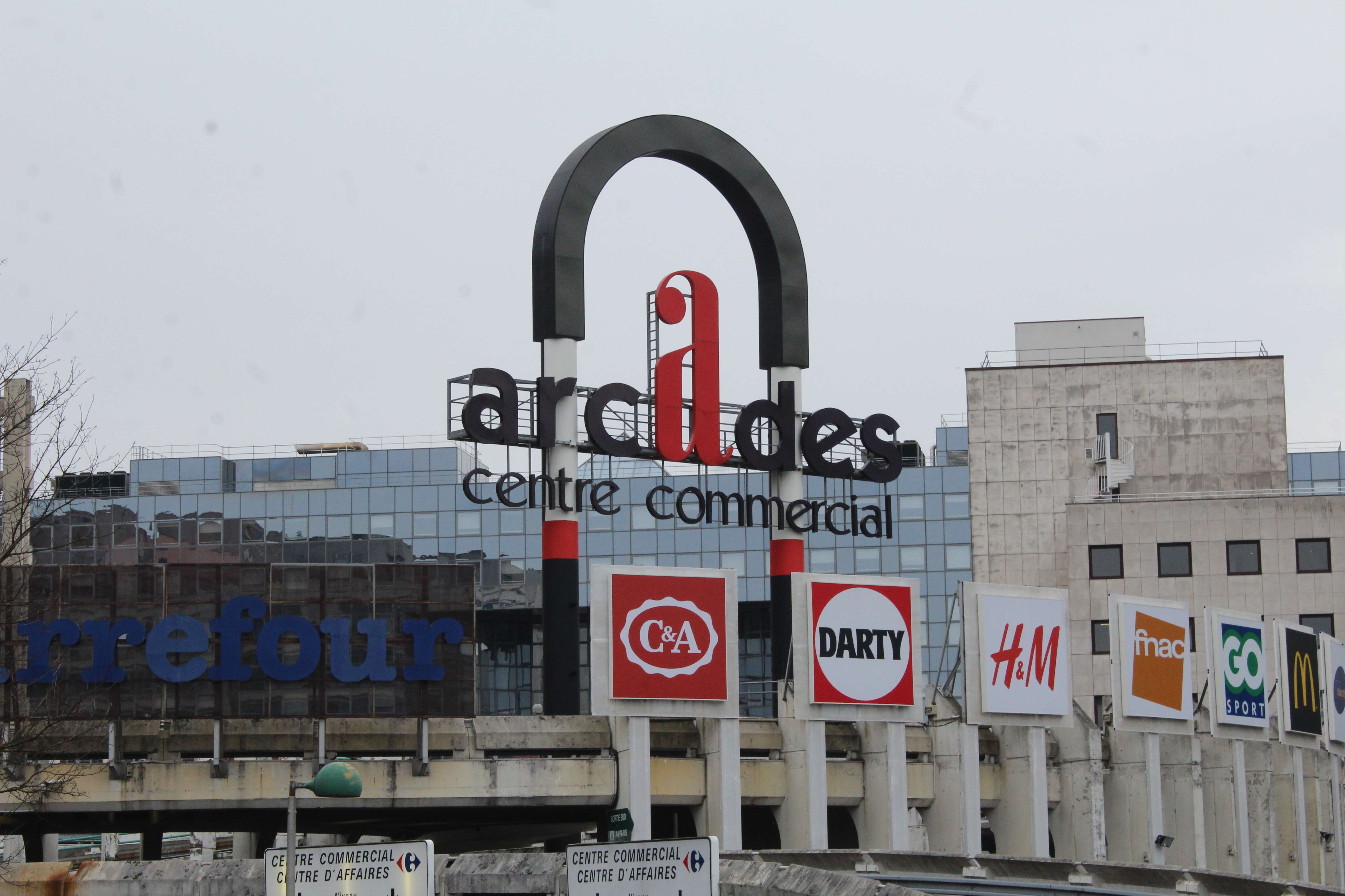 Centre commercial Les Arcades à Noisy-le-Grand.